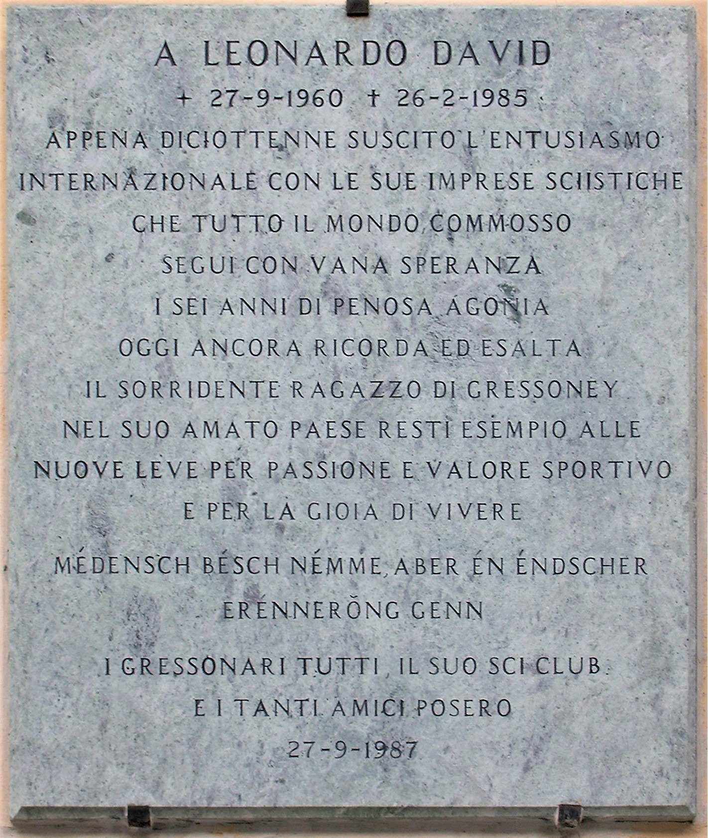 placca per Leonardo David, Gressoney-La-Trinité